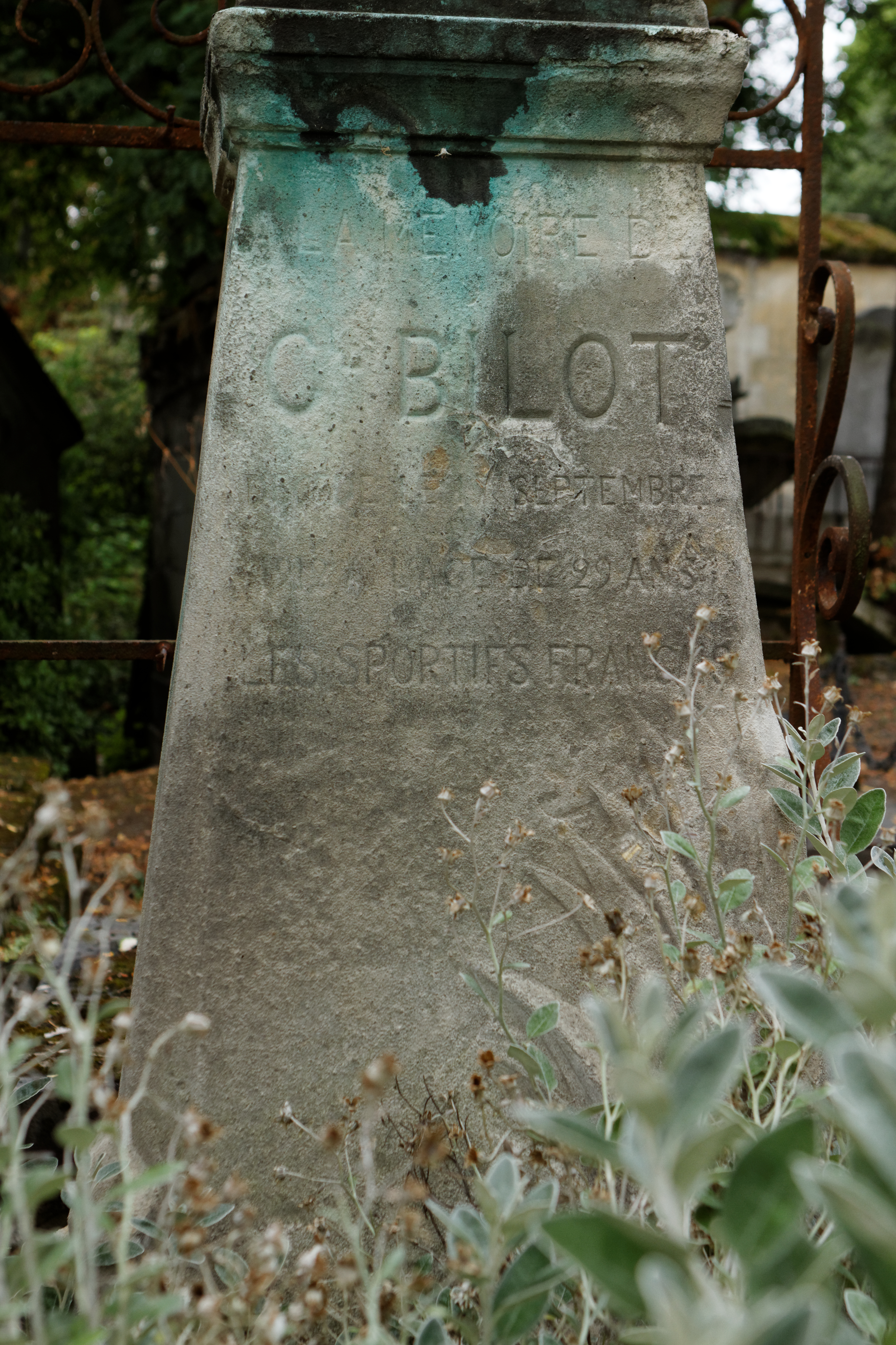 Sépulture de Charles Bilot (1883-1912), footballeur.